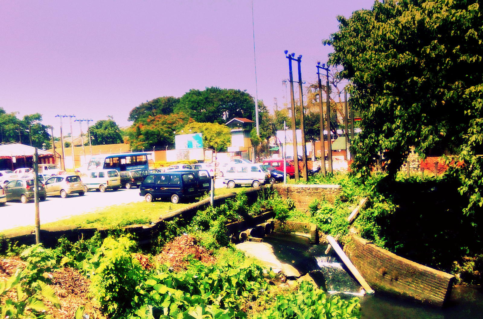 Photo